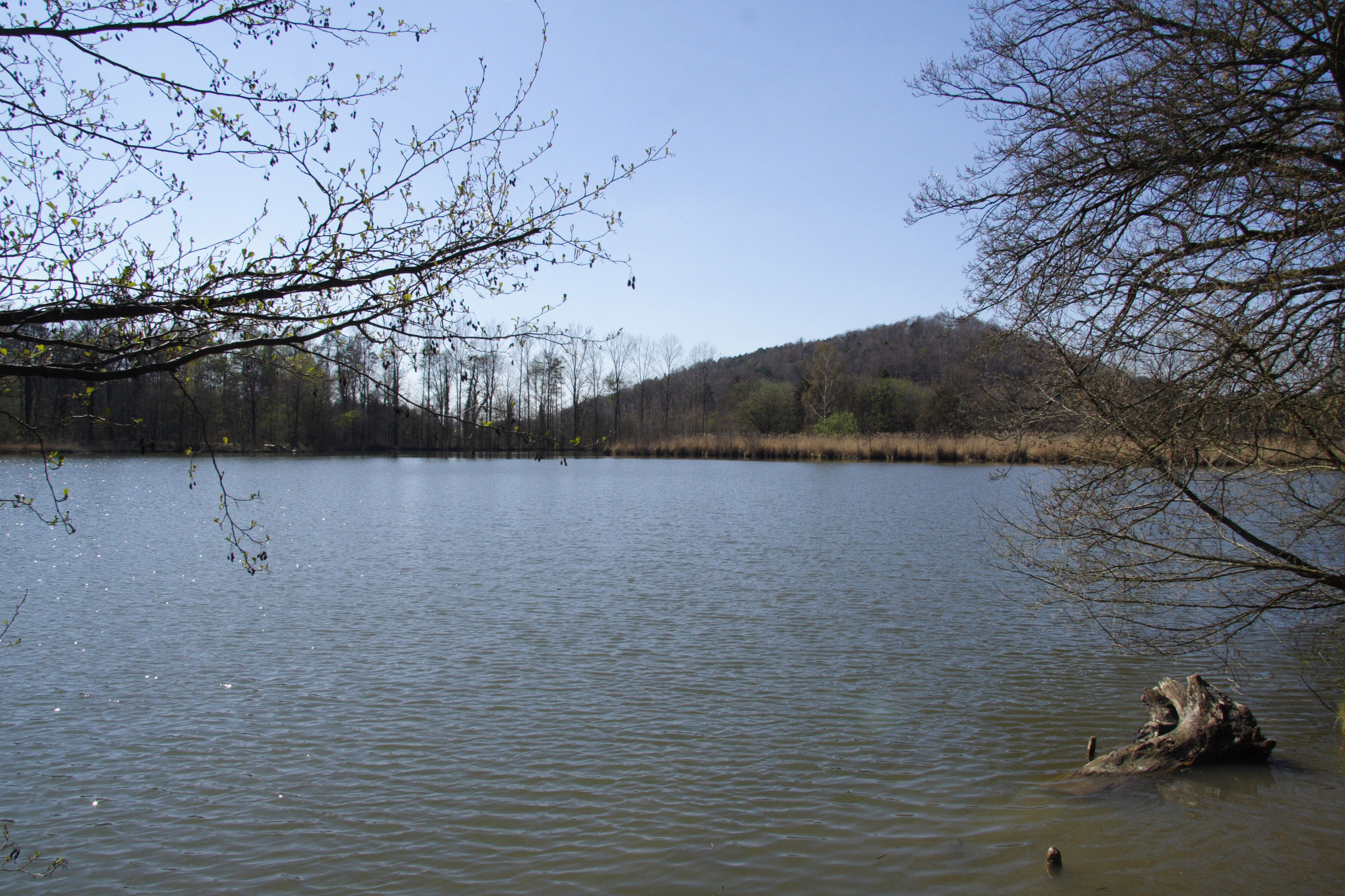 Blick über den Bleichsee von Osten nach Westen